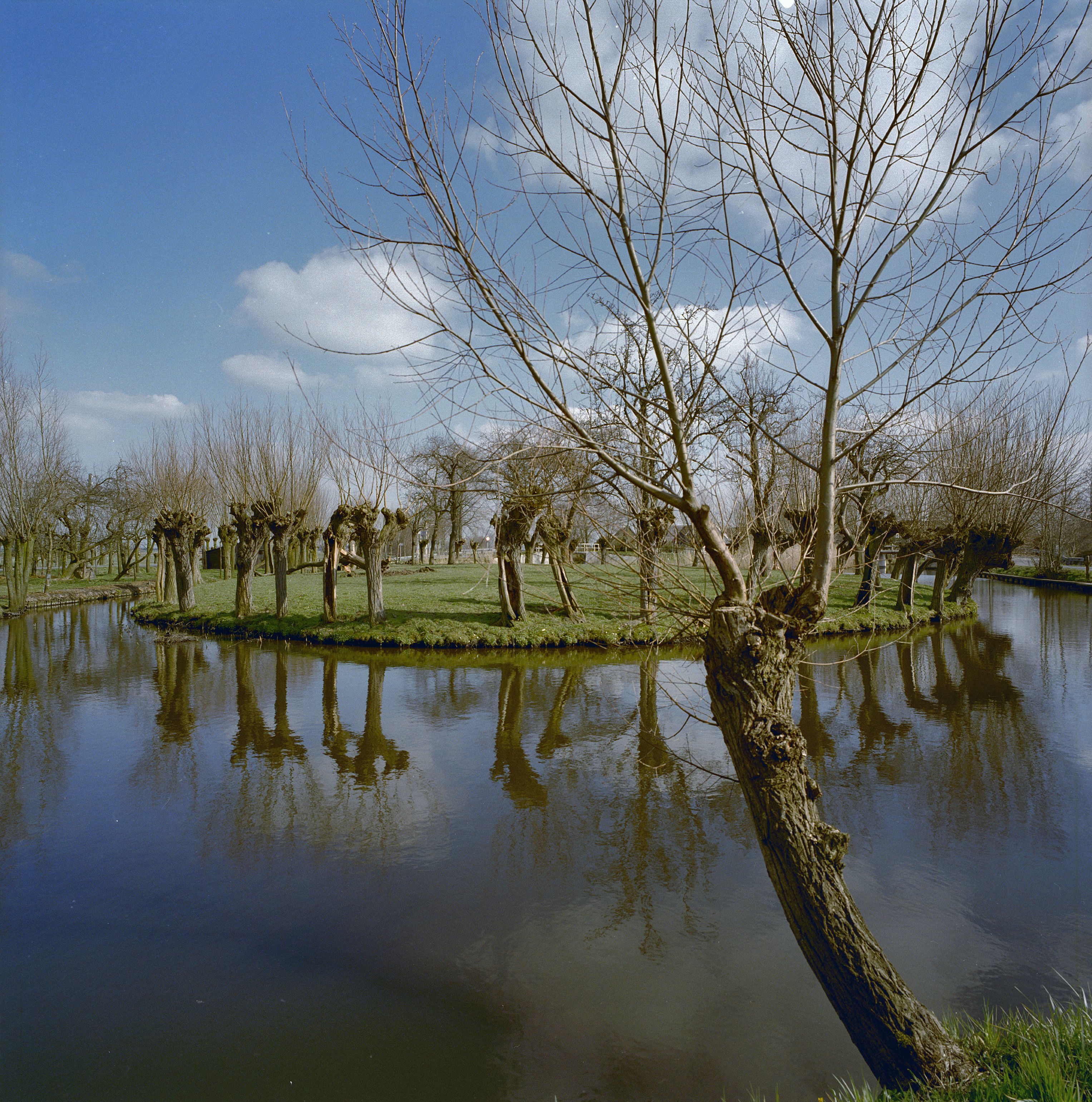 Ronde Schans of Koeneschans: Overzicht